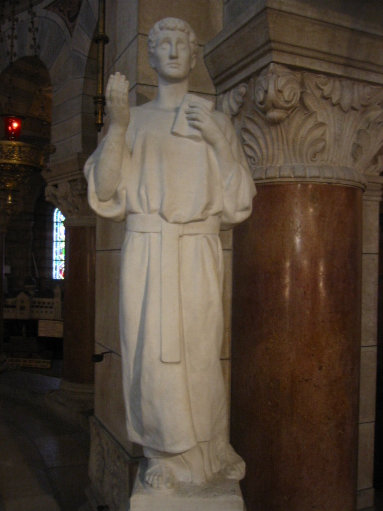 Saint Ferjeux de Besançon (Ferrutio of Besançon)